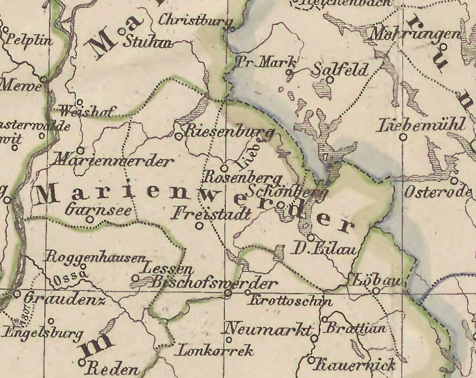 Karte: Kreis Marienwerder von 1752 bis 1818